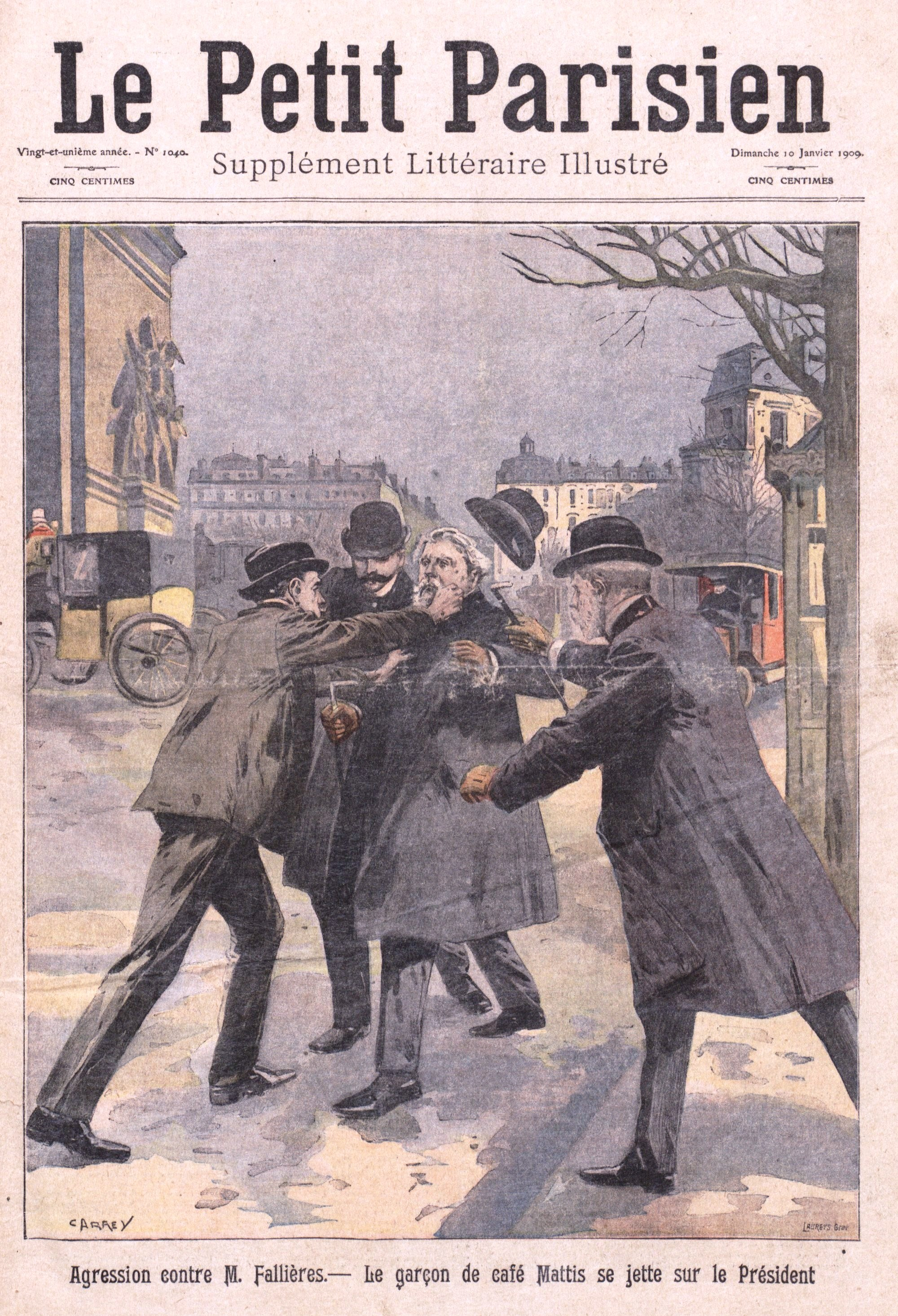 "Agression contre M. Fallières. - Le garçon de café Mattis se jette sur le Président" [le 25 décembre 1908].